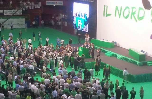 Colleghi e fotografi si avvicinano al palco per il discorso conclusivo di Roberto Maroni al V Congresso federale al Forum d'Assago, il 1° luglio 2012.